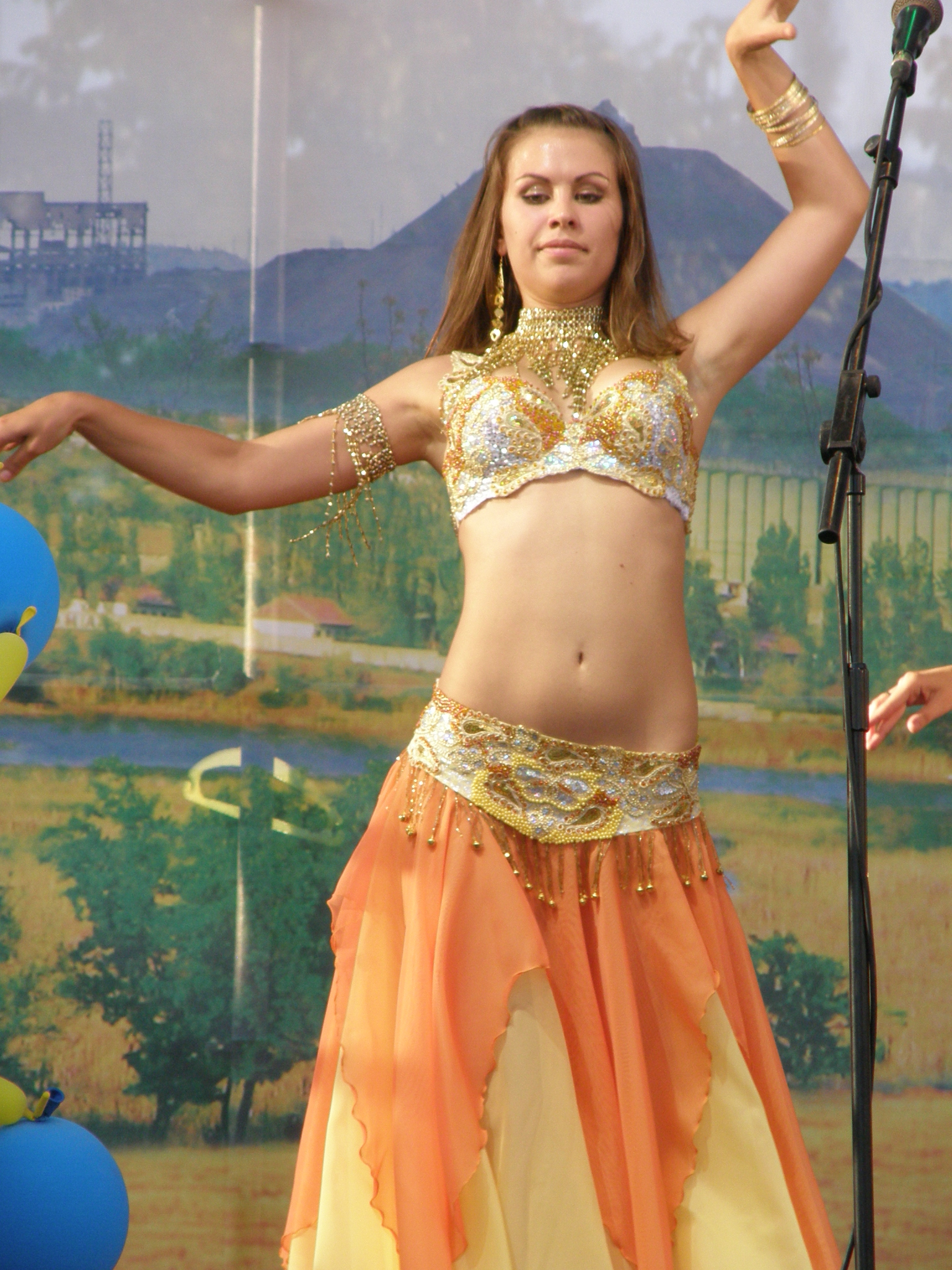 Донецк. Празднование дня независимости Украины.